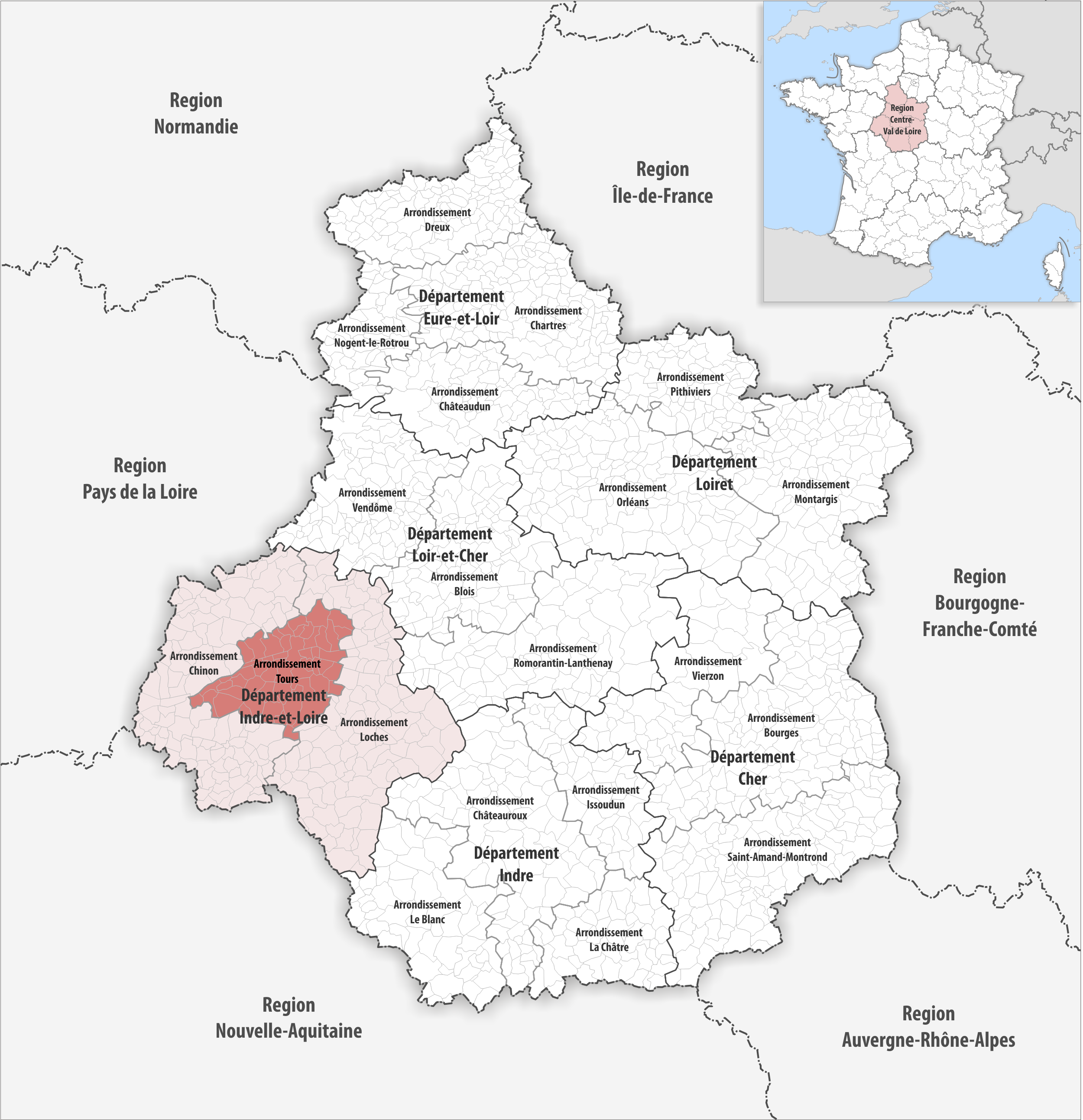 Lage des Arrondissements Tours